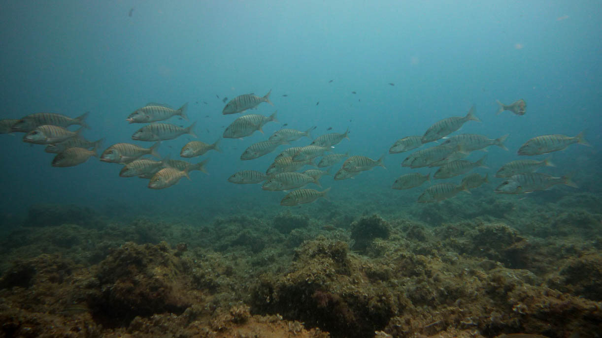 Banco de Lithognathus mormyrus (magres) en los fondos de El Portús en Cartagena (España)